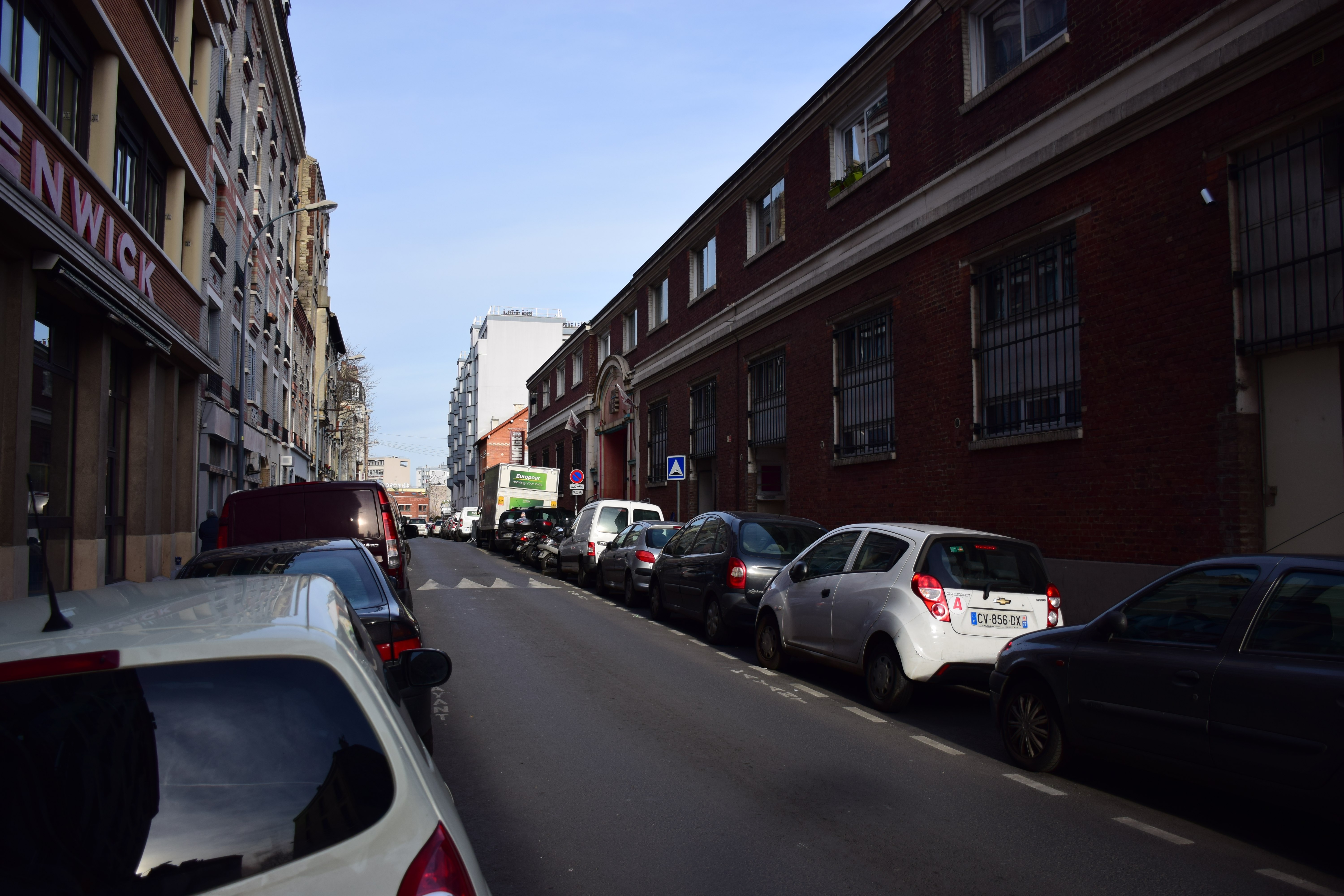 Rue Gaudillot (Saint-Ouen, France).